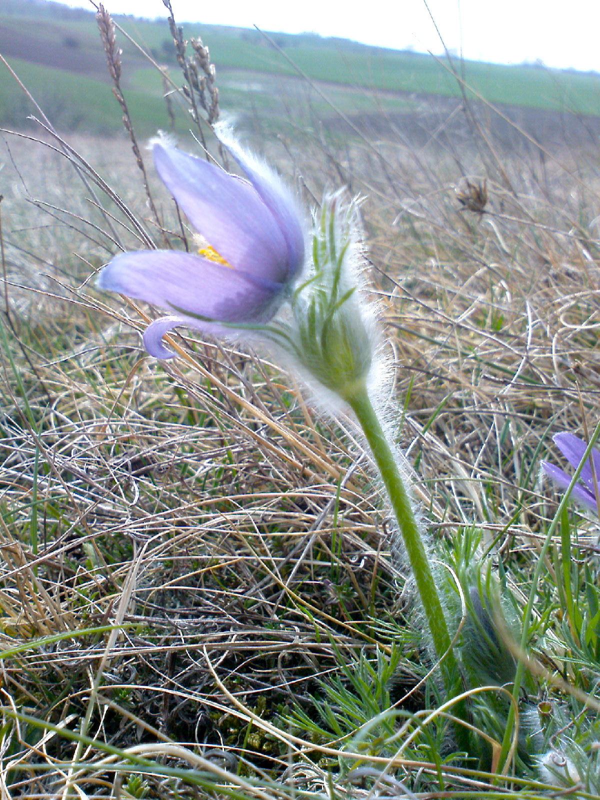 Gewöhnliche Küchenschelle (Pulsatilla vulgaris), NSG Lunzberge